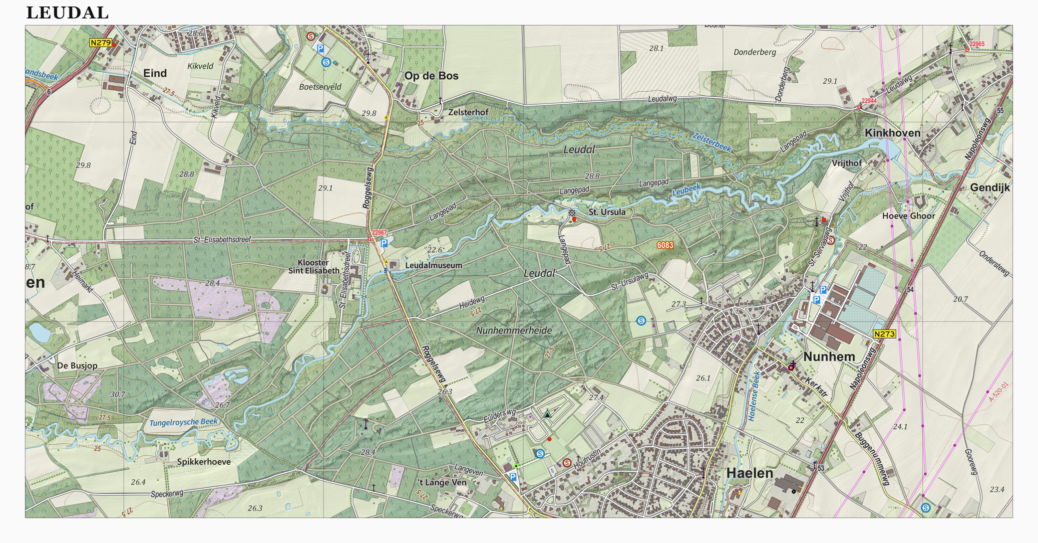 Topografische kaart van het Leudal (natuurgebied). Resolutie: 400 pixels/km. Samengesteld door Jan-Willem van Aalst op basis van de GML open geodata van de BRT/Top10NL (basisregistratie Topografie, Kadaster), vrijgegeven door Kadaster onder de Creative Commons BY licentie. Additionele gegevens uit BAG uit de Open Street Map en uit de Risicokaart. Zie ook de Legenda.